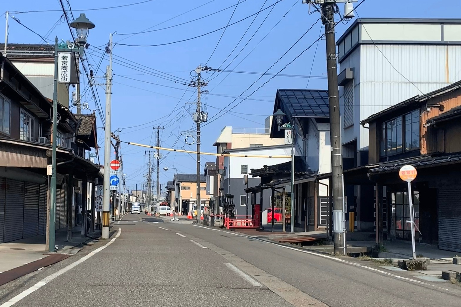 新潟県道9号長岡栃尾巻線 加茂市若宮町付近と加茂市営市民バス（2020年4月）